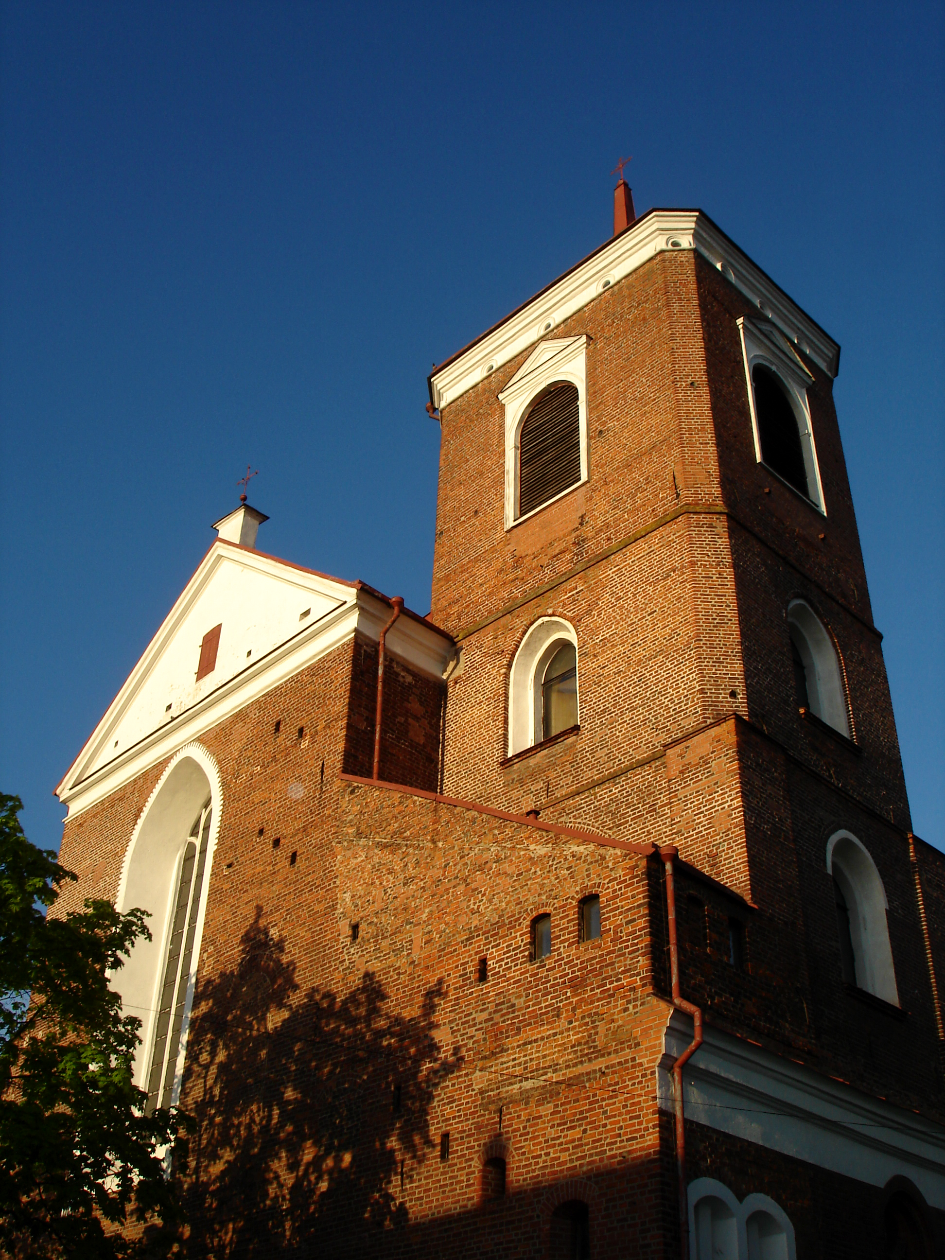 Kathedrale von Kaunas.